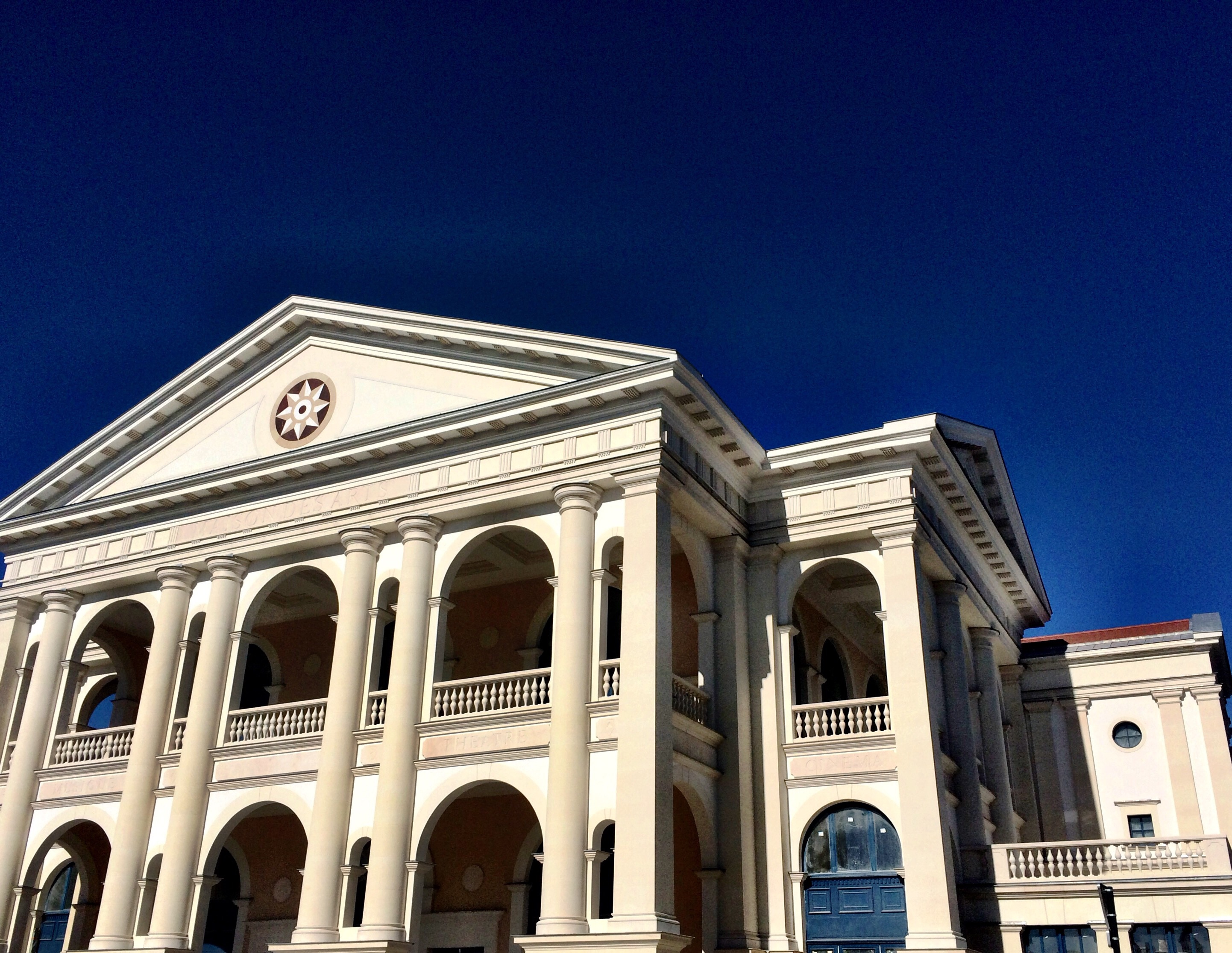 Façade du pôle culturel du Plessis-Robinson - vue de la façade légèrement côté droit